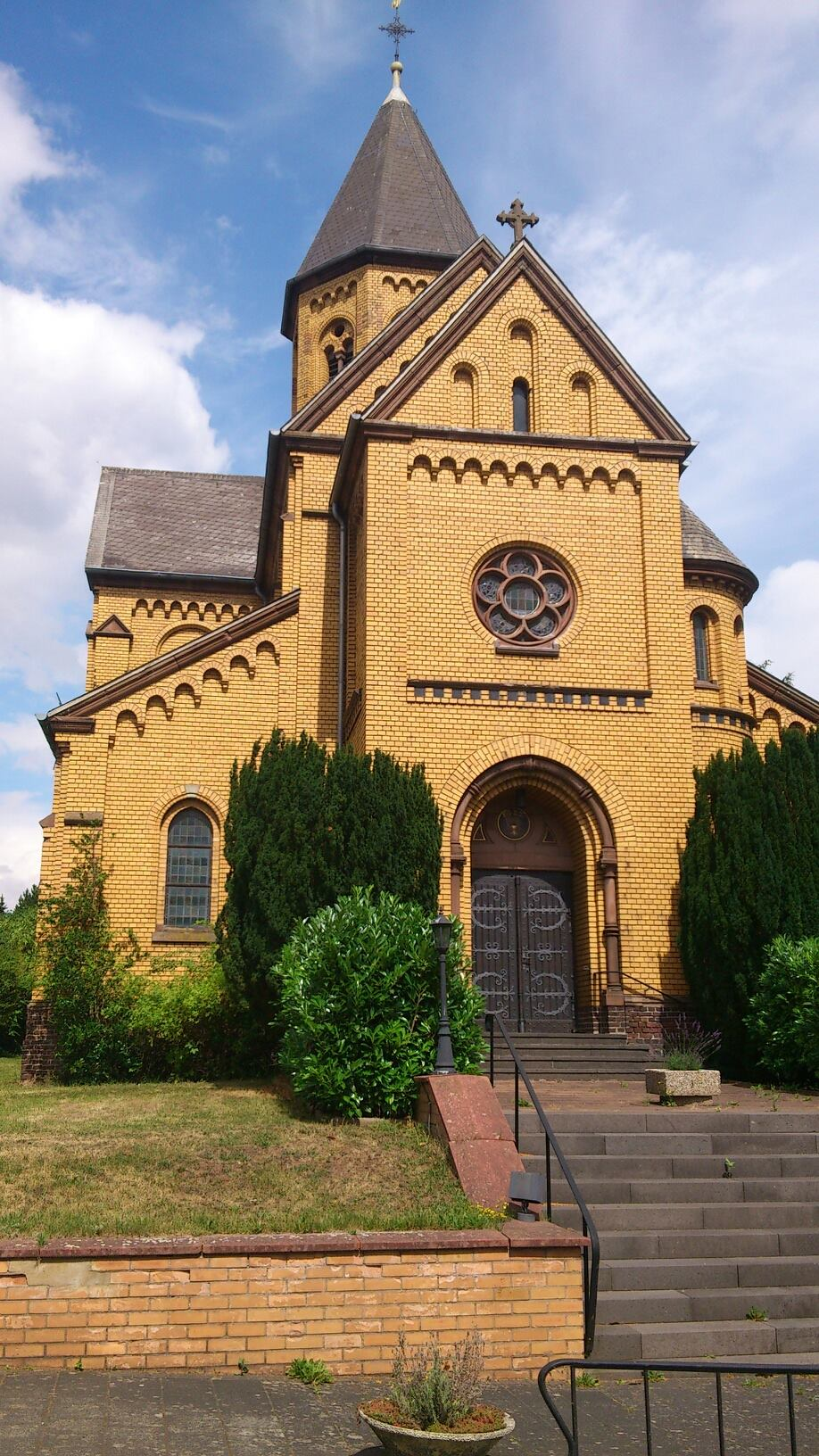 Kath. Kirche St. Johannes der Täufer